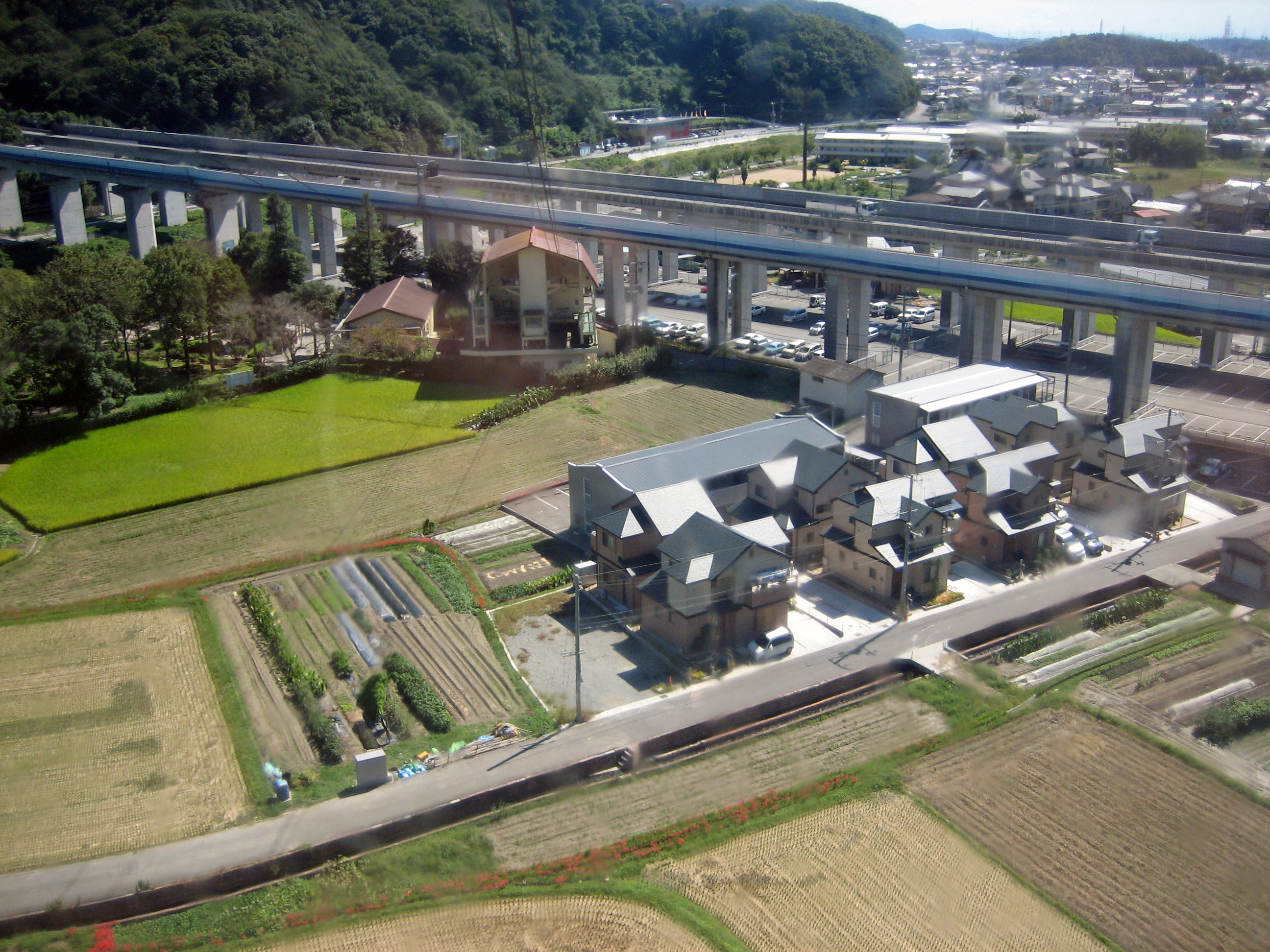 山頂へ登る書写山ロープウェイのゴンドラより見た書写山ロープウェイ駅。